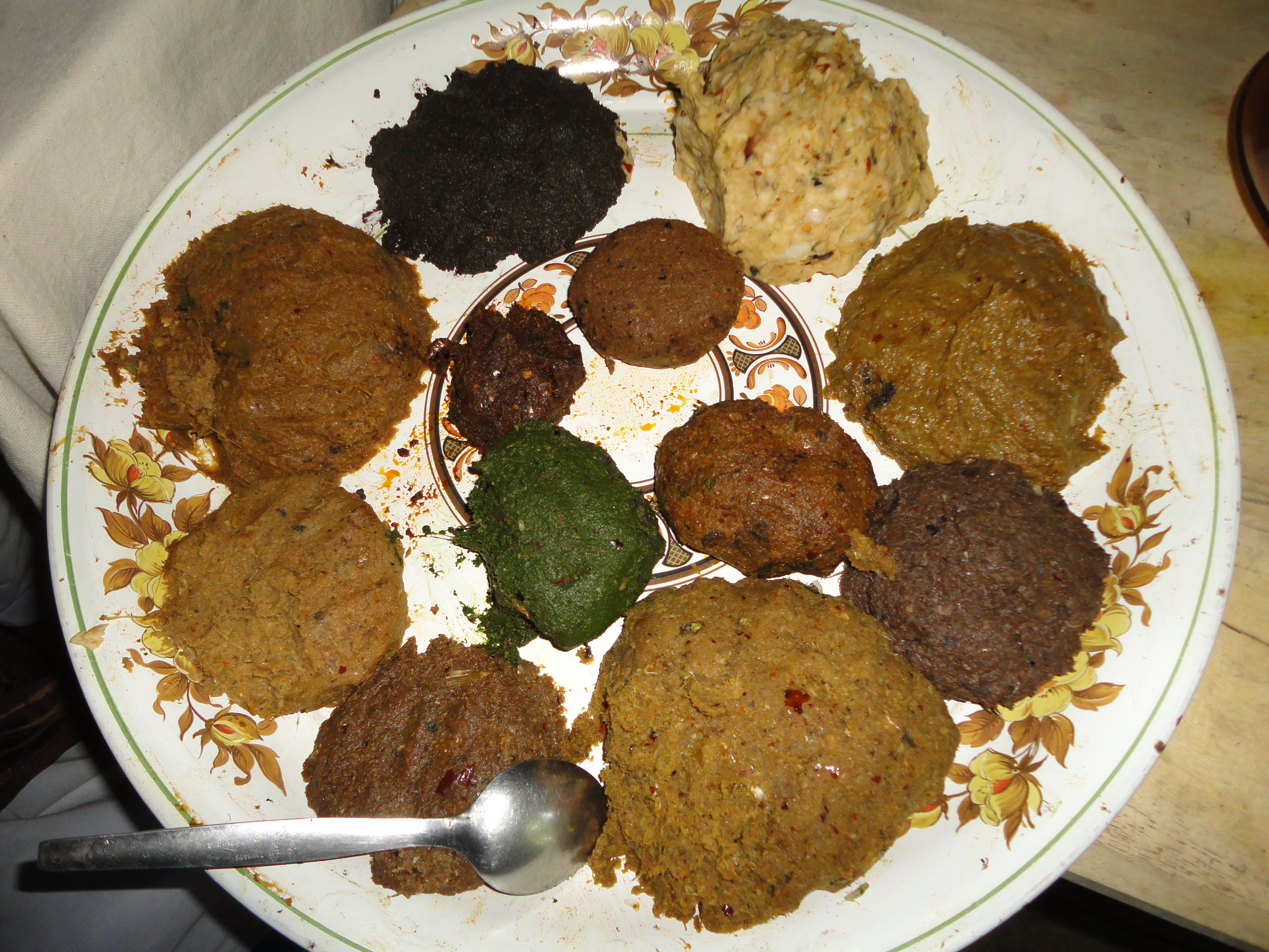 বিভিন্ন রকমের ভর্তা। বাংলাদেশের খাবার।